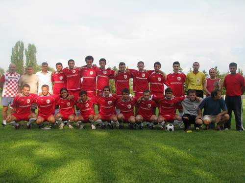 nogometni klub Nogometni klub "Borac" Kneževi Vinogradi, Kneževi Vinogradi